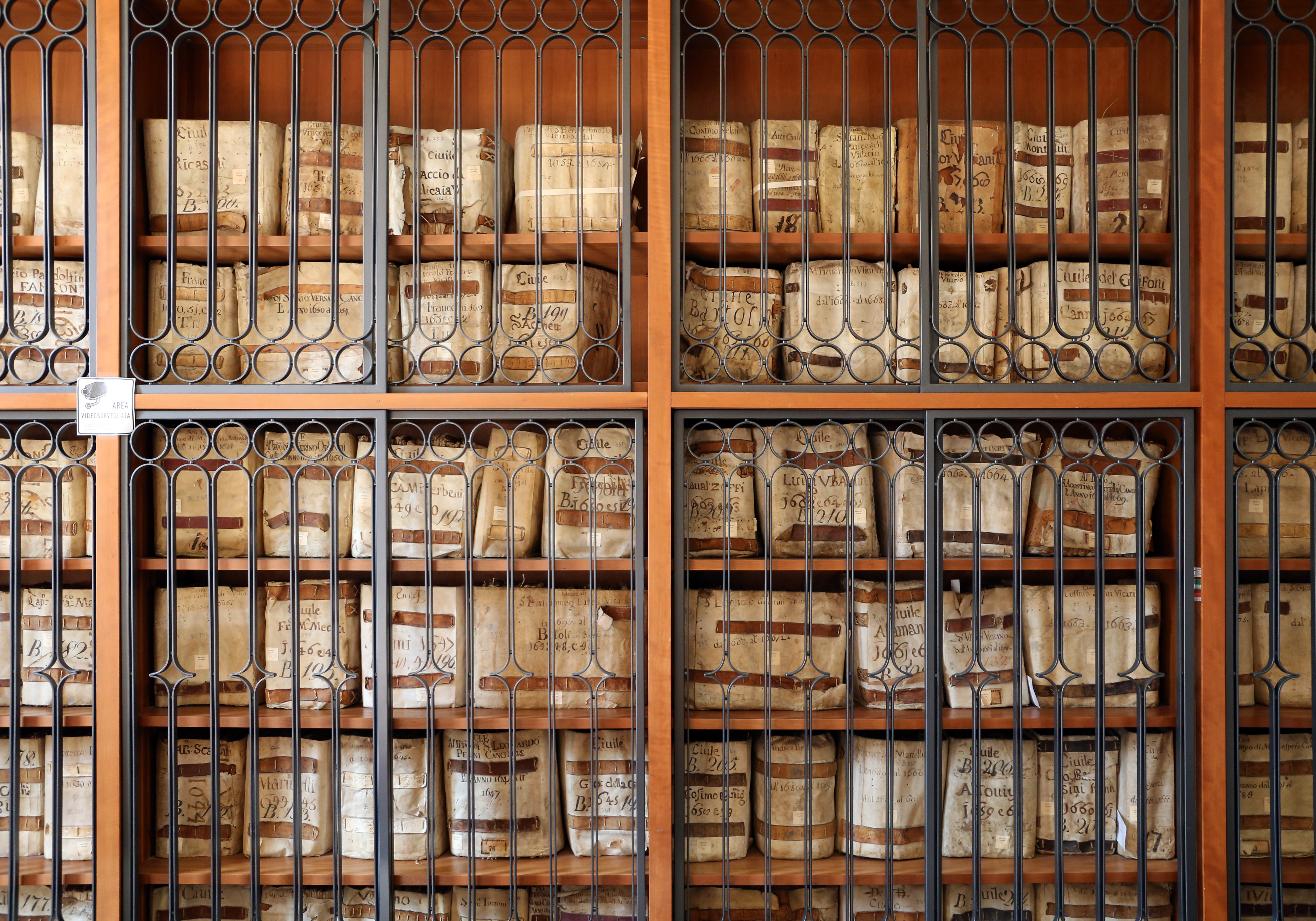 Sezione di Archivio di Stato di Pescia This is a photo of a monument which is part of cultural heritage of Italy.